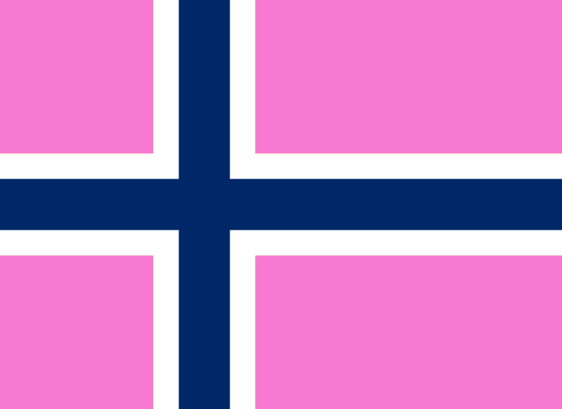 Bandera gay Noruega.